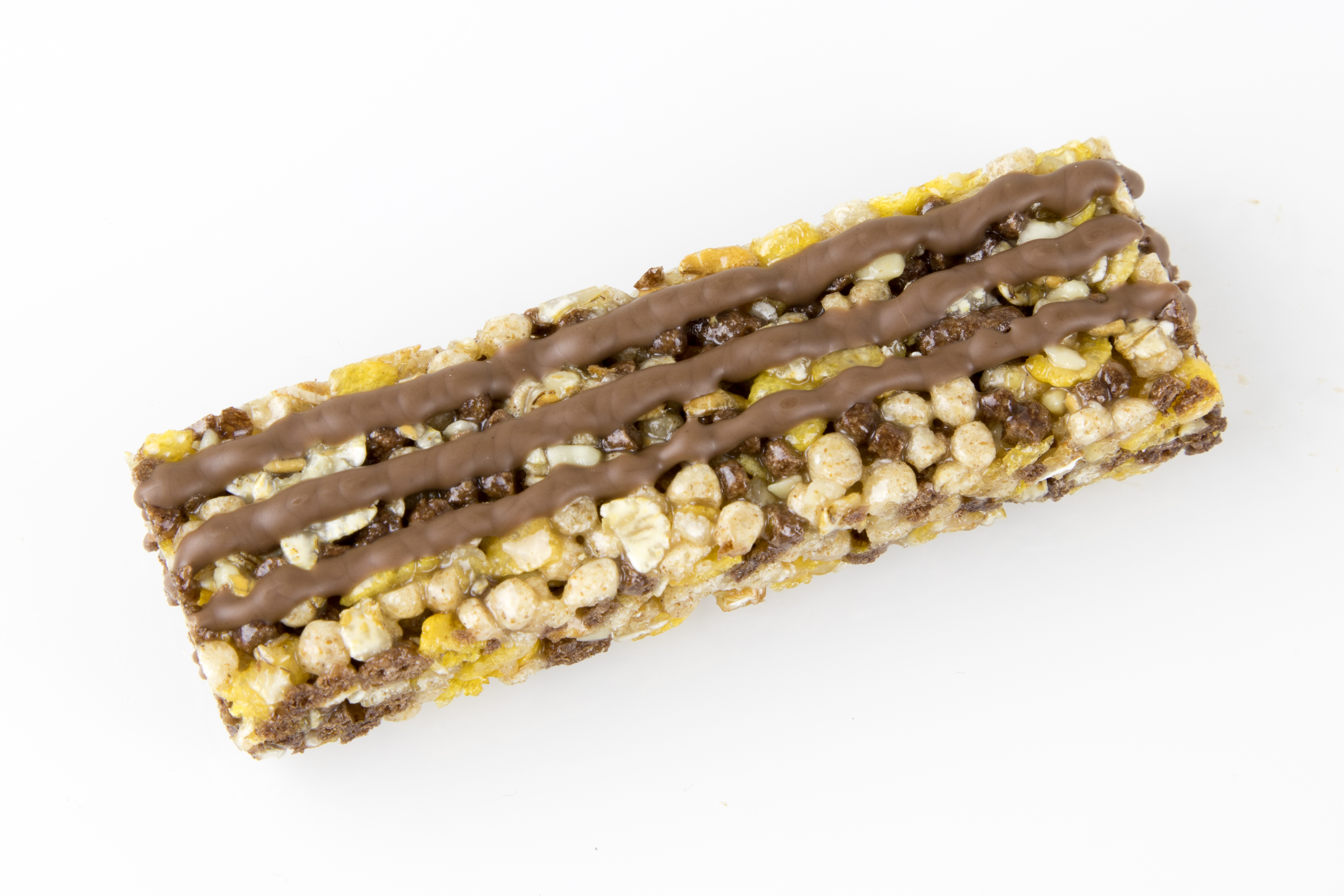 Muesliriegel Marke "Corny Free Schoko"